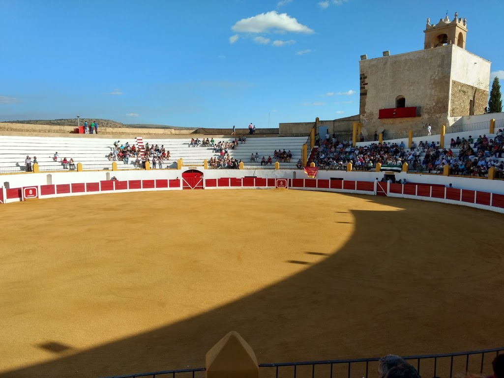 Castillo de las siete torres (Castillo de Barcarrota)